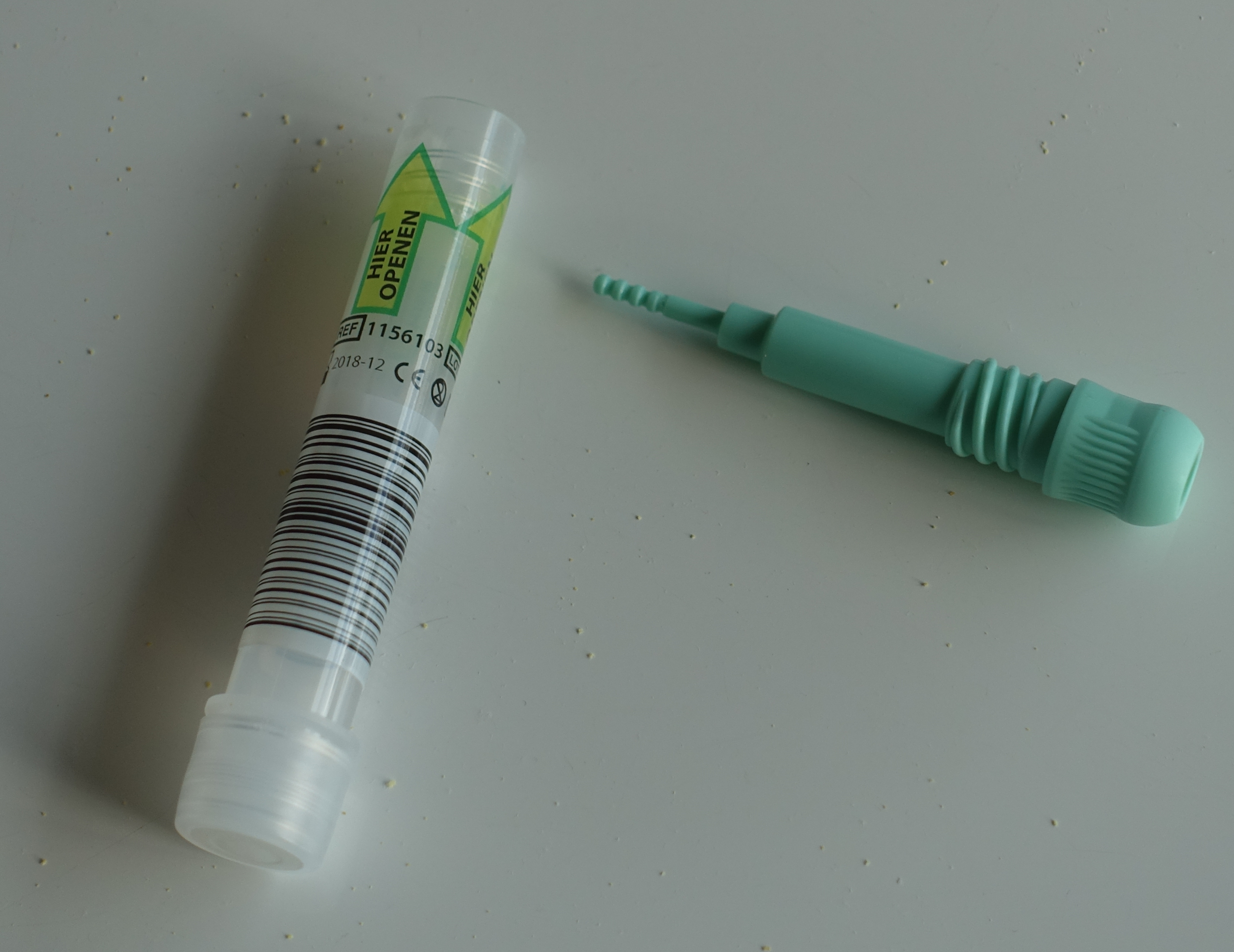 Materiaal voor het nemen van monsters van de ontlasting ten behoeve van het bevolkingsonderzoek naar darmkanker in Nederland, 2017. Inclusief verzendmateriaal.